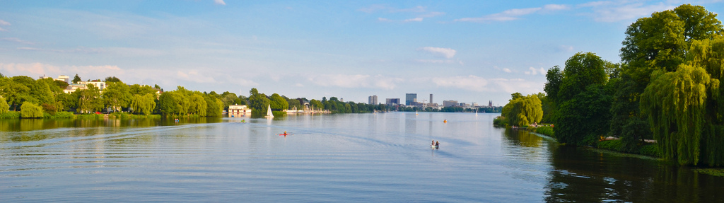 An der Alster